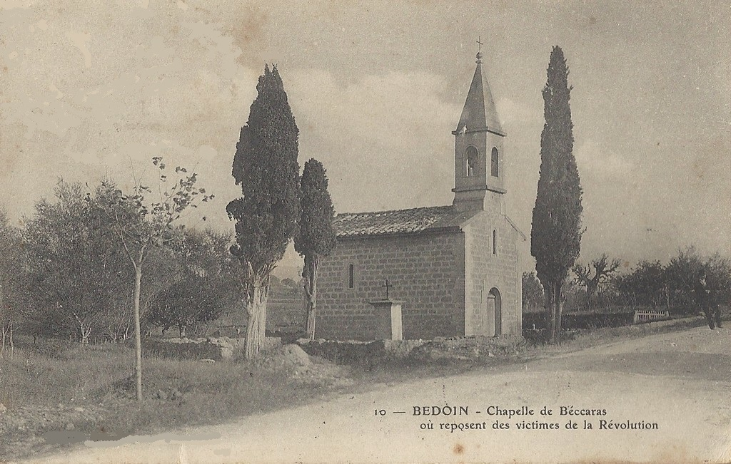 Chapelle de Béccaras